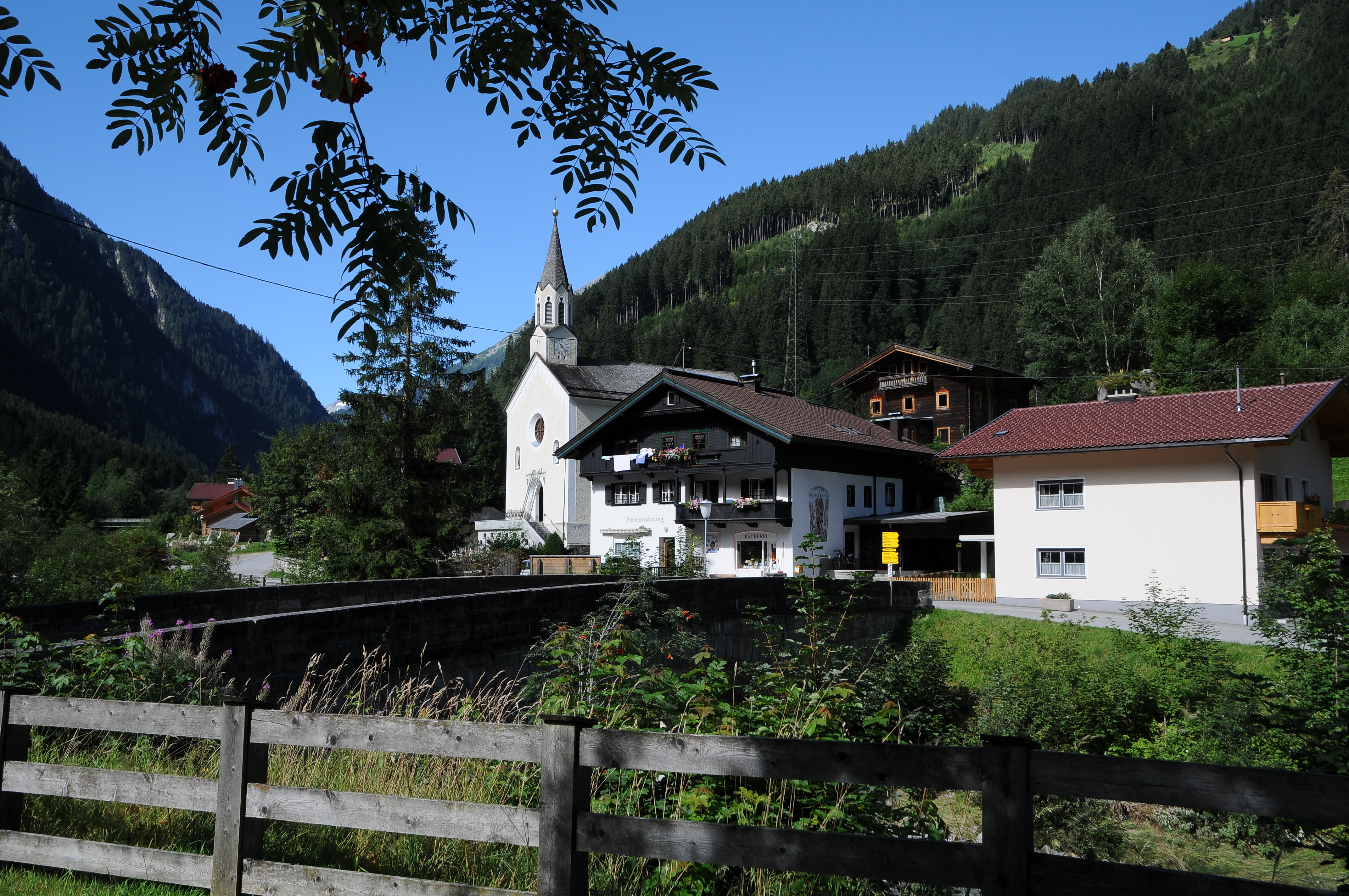 Pfarrkirche Mariae Himmelfahrt in Dornauberg-Ginzling, einem Ortsteil von Mayrhofen und Finkenberg.